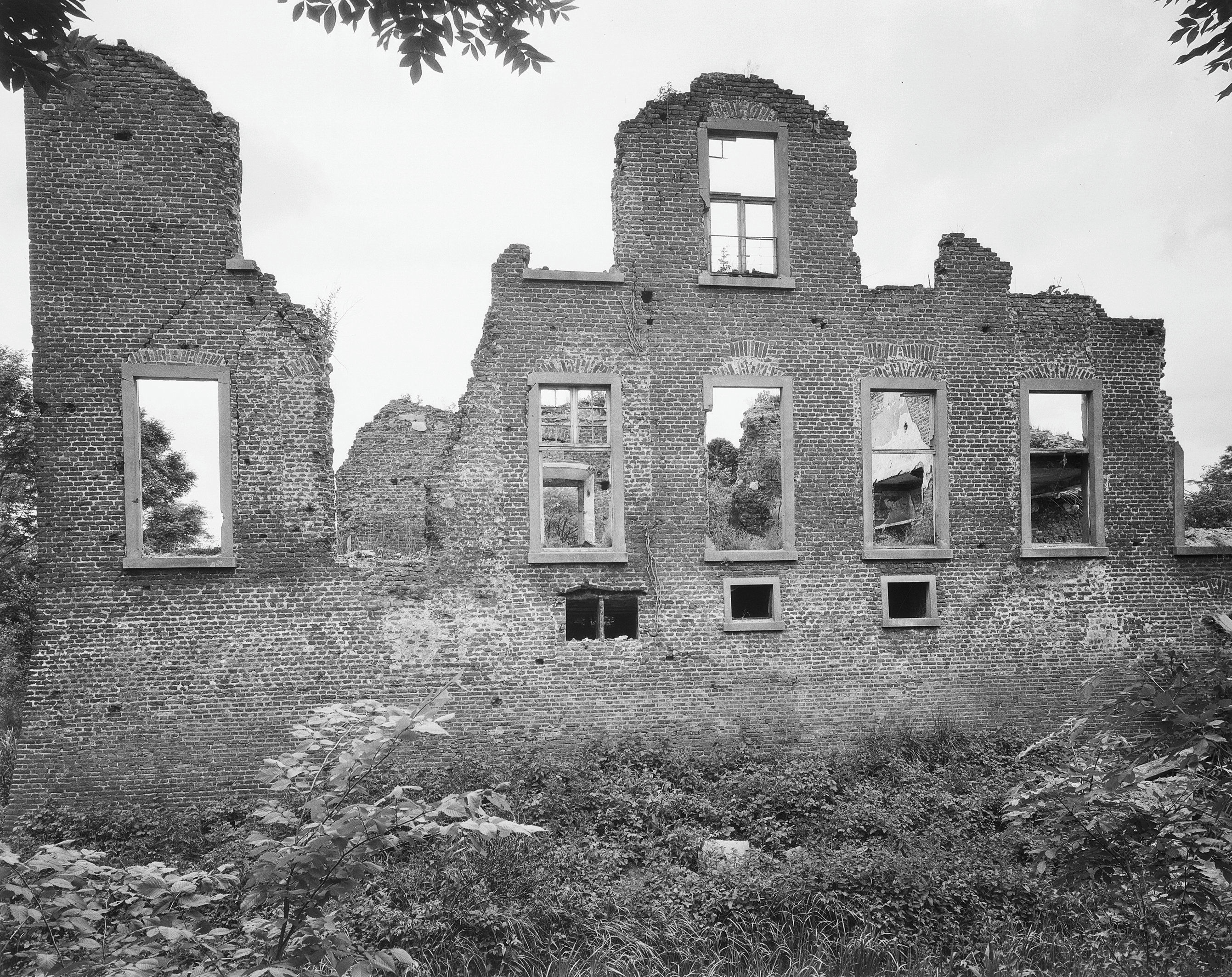 Kasteel Geysteren: ruïne